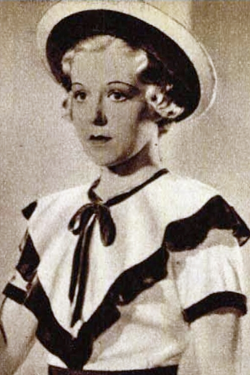 Perczel Zita a Budai cukrászda című 1935-ös filmben